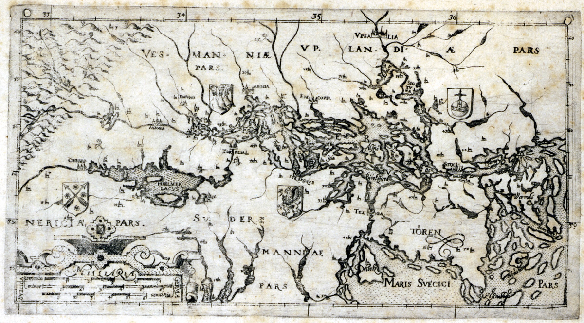 Andreas Bureus Mälarkarta